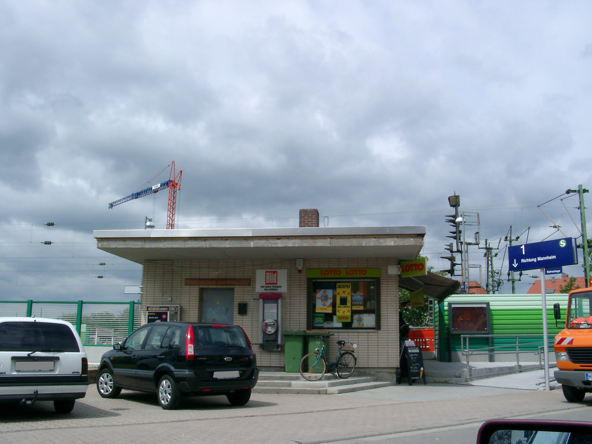 Oftersheim, Bahnhof